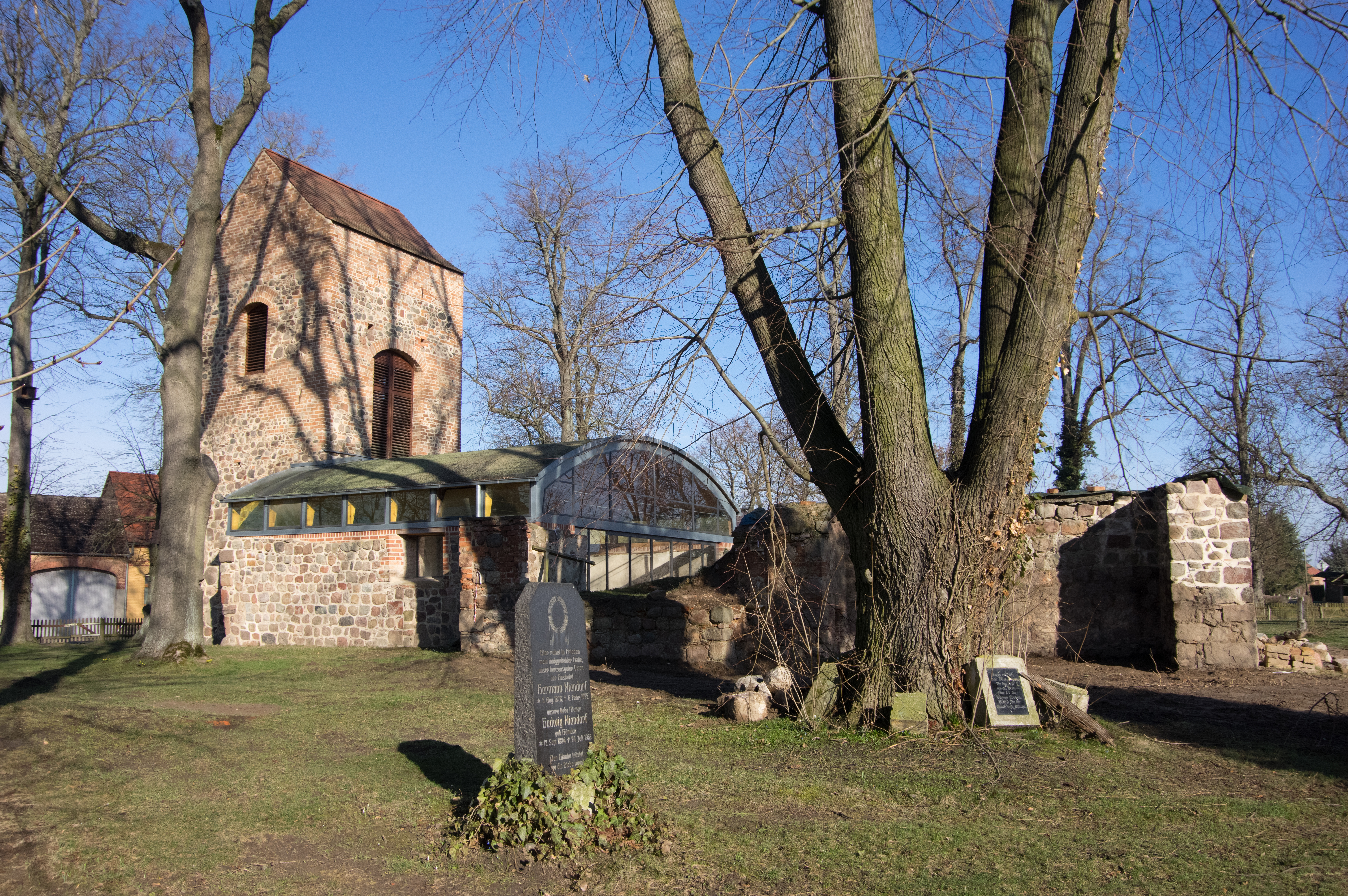 Dahme/Mark, Ortsteil Heinsdorf in Brandenburg. Die Kirche steht unter Denkmalschutz.